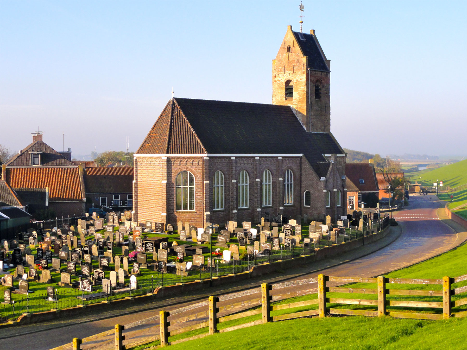 Mariakerk aan het Tsjerkeplein 4 in Wierum